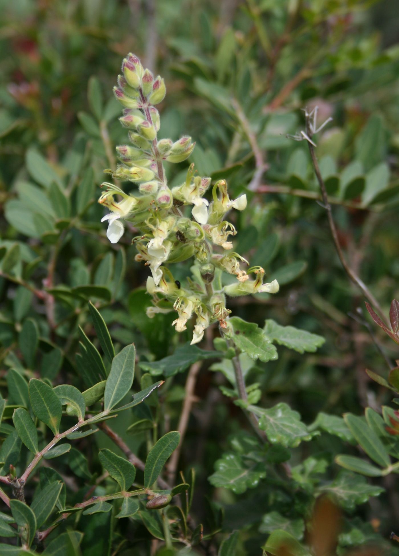 Teucrium flavum subsp. flavum, Lippenblütler (Lamiaceae) - Italien/Italia/Italy: Kalabrien/Calabria, Prov. Crotone, Capo Rizzuto S Crotone